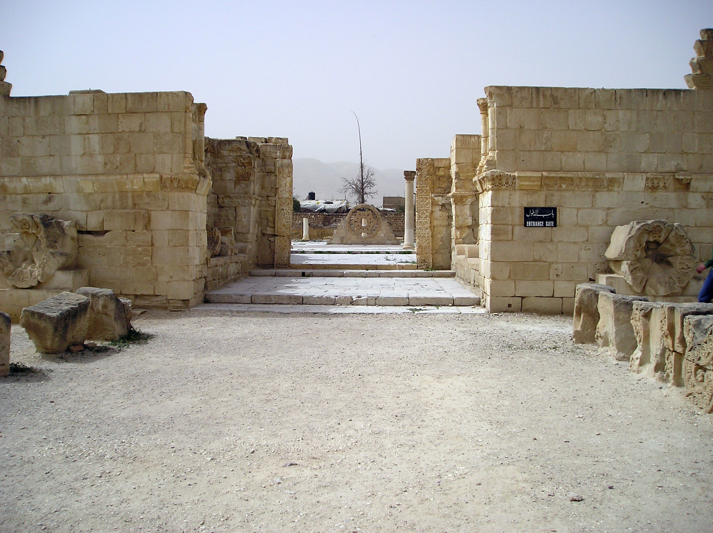 Pozostałości pałcu z VIII w. w Khirbet al-Mafjar w Jerychu (Autonomia Palestyńska).